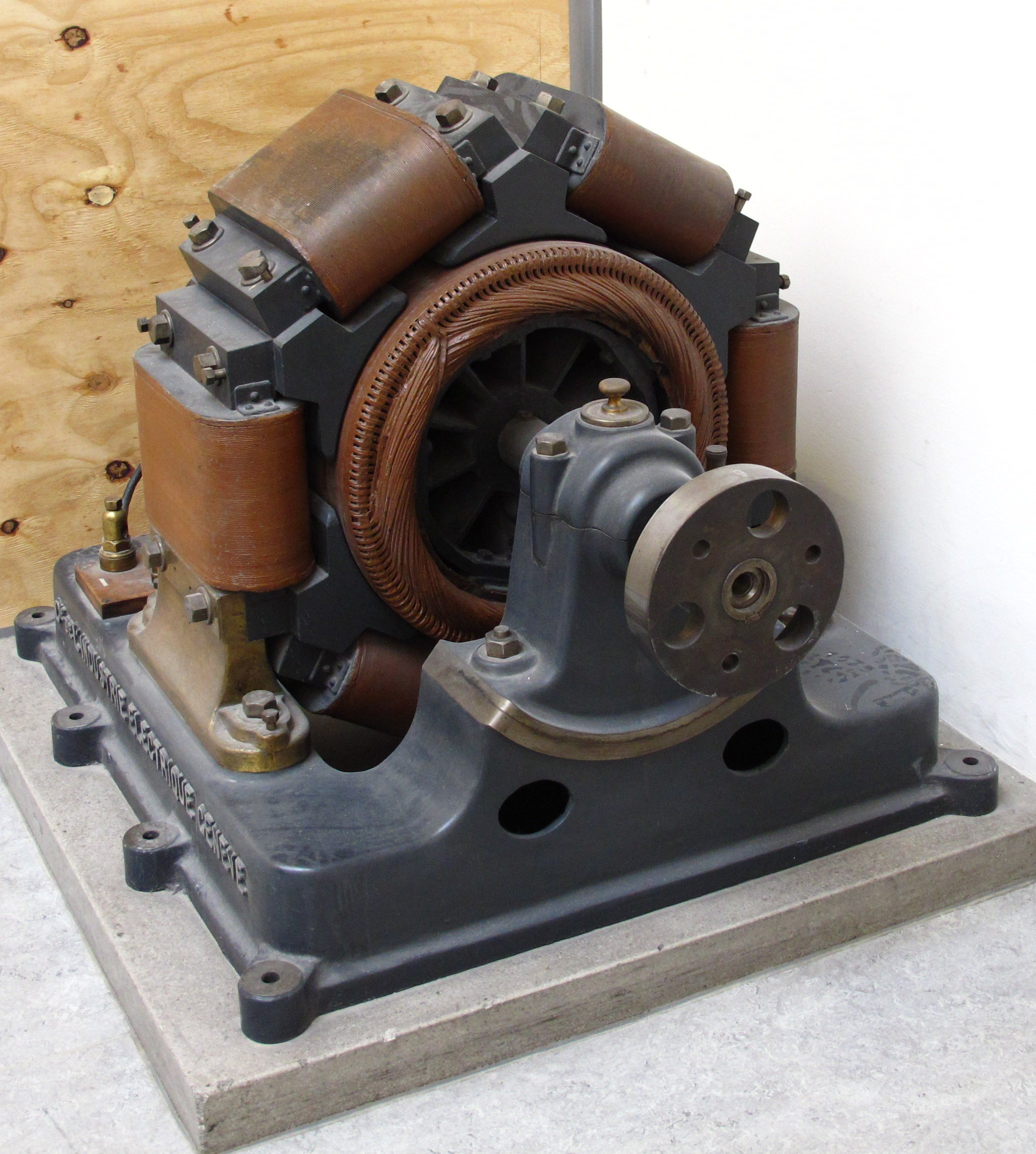 Gleichstromgenerator von Thury, 1896. Diese Maschine diente in der Gleichstromübertragung La Chaux-de-Fonds nach dem System Thury als Stromerzeuger. Leistung: 33 kW Spannung: 150 V Max. Strom: 220 A